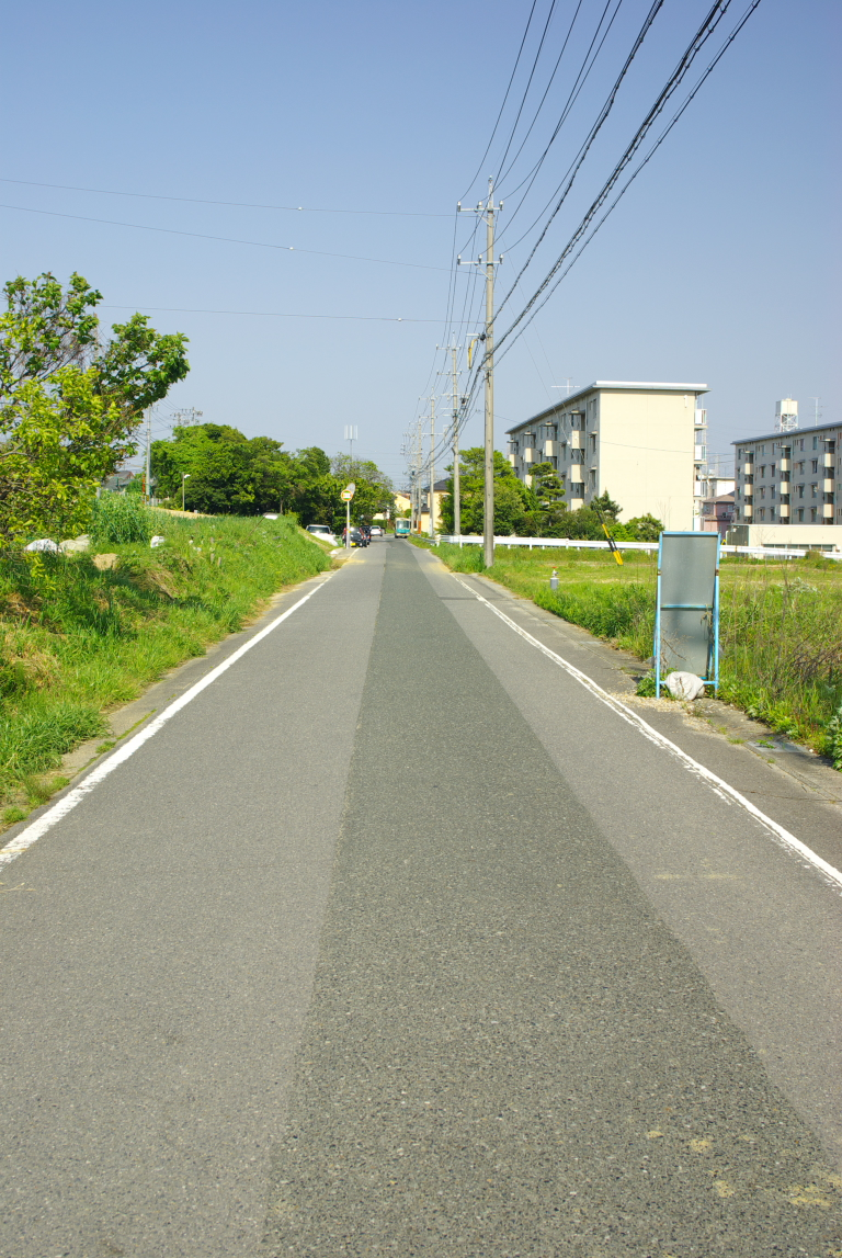 大府市長草ウド交差点付近